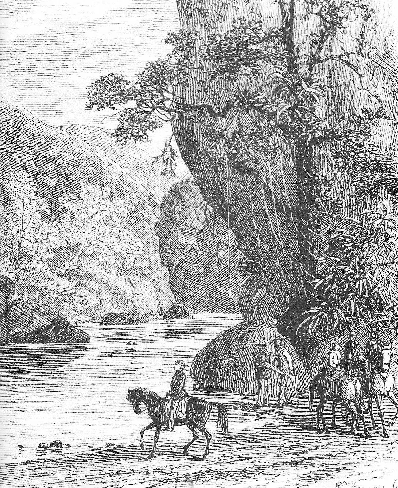 Vista del Peñón de El Encantado con el grupo de excursionistas acompañantes de James Mudie Spence en 1872. Grabado a partir de una acuarela de Ramón Bolet (1836-1876). En: SPENCE, J. M. 1878. The land of Bolívar or war, peace, and adventure in the Republic of Venezuela. Sampson Low, Marston, Searle, & Rivington, London, vol. 1, 323 pp, vol. 2, 345 pp.